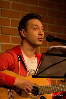 Loncew